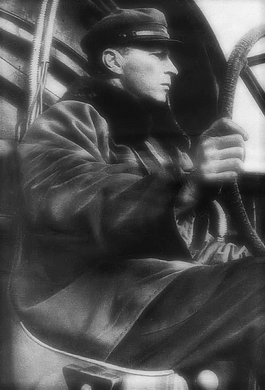 Заслуженный лётчик СССР Михаил Михайлович Громов за штурвалом самолёта-гиганта АНТ-20 «Максим Горький». Через несколько месяцев ему будет присвоено звание Героя Советского Союза за рекордный по дальности и продолжительности перелёт по замкнутому маршруту Москва—Рязань—Харьков протяжённостью 12 411 км